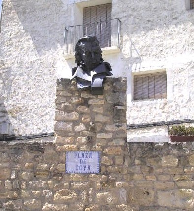 Stèle vum Francisco de Goya a sengem Heemechtsduerf Quell: eege Foto vum Les Meloures